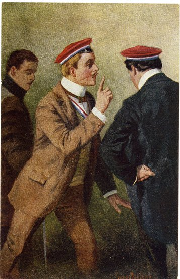 "Mensurkritik", um 1900. Verbindungsstudenten nehmen in einer Pause die Bewertung einer Mensur vor, im Hintergrund wartet der Sekundant auf die Entscheidung über eine eventuelle Abfuhr.